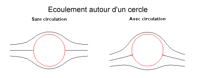 Ecoulement autour d'un cercle, Image personnelle